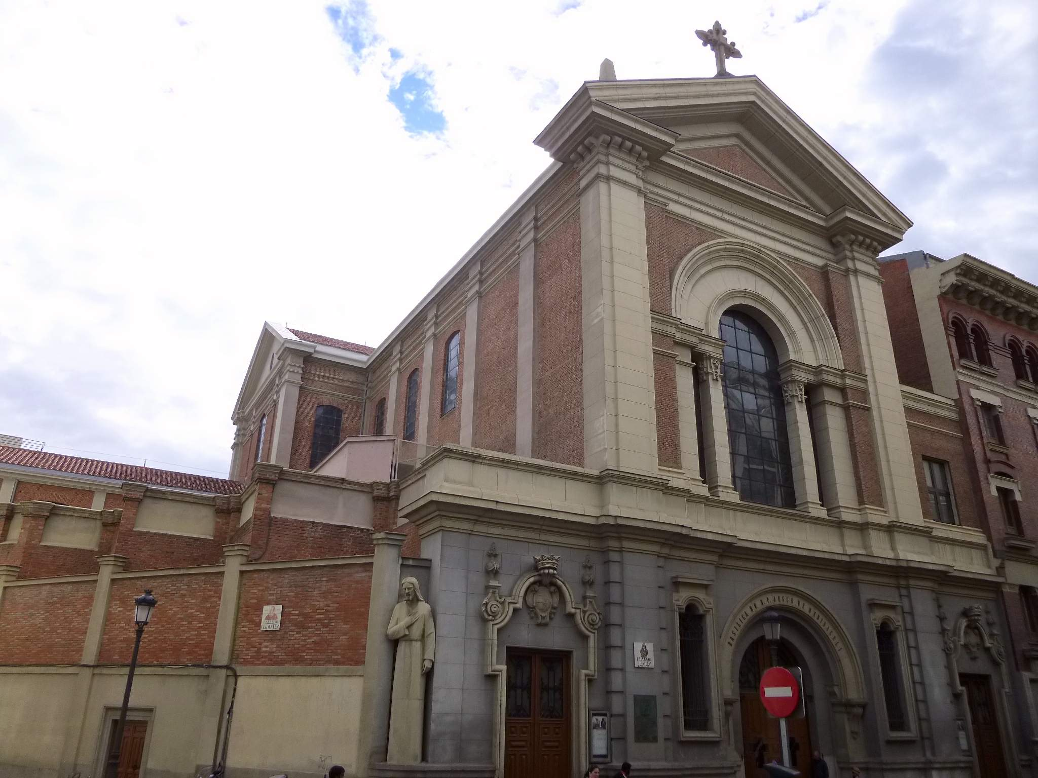 Basílica de Jesús de Medinaceli (Madrid)